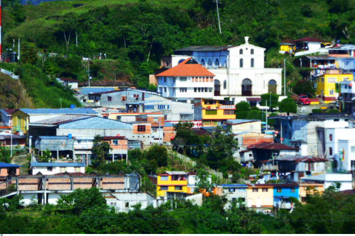 Casabianca es un pueblo con hermosos paisajes, atardeceres increíbles., allí muy cerca se encuentra el nevado del ruiz, sus costumbres son muy cafeteras así que encuentras dos tipos de paisajes el hermoso páramo y sus bellos cafetales, gran variedad de fauna y flora. Esta fotografía fue tomada en un área protegida de Colombia con el no enlistada código área no enlistada del RUNAP.